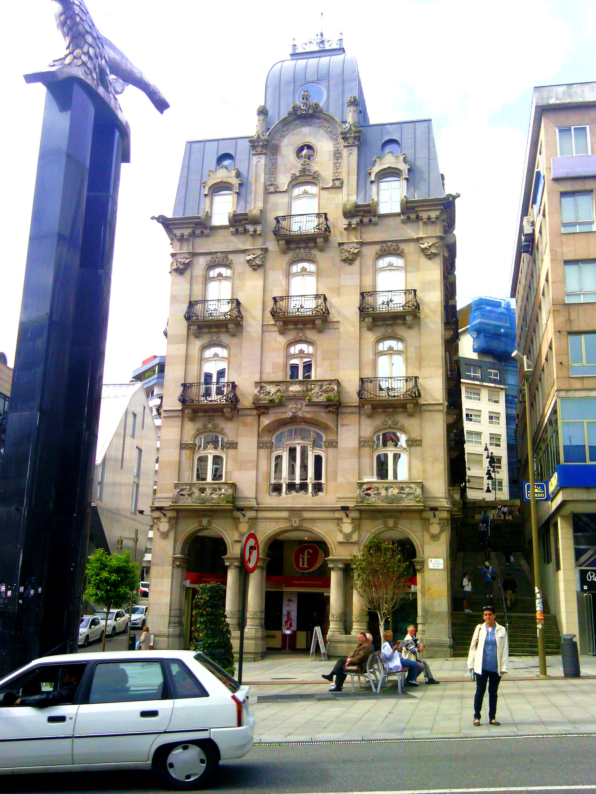 Vista del edificio SimeónGalego: Vista do edificio Simeón